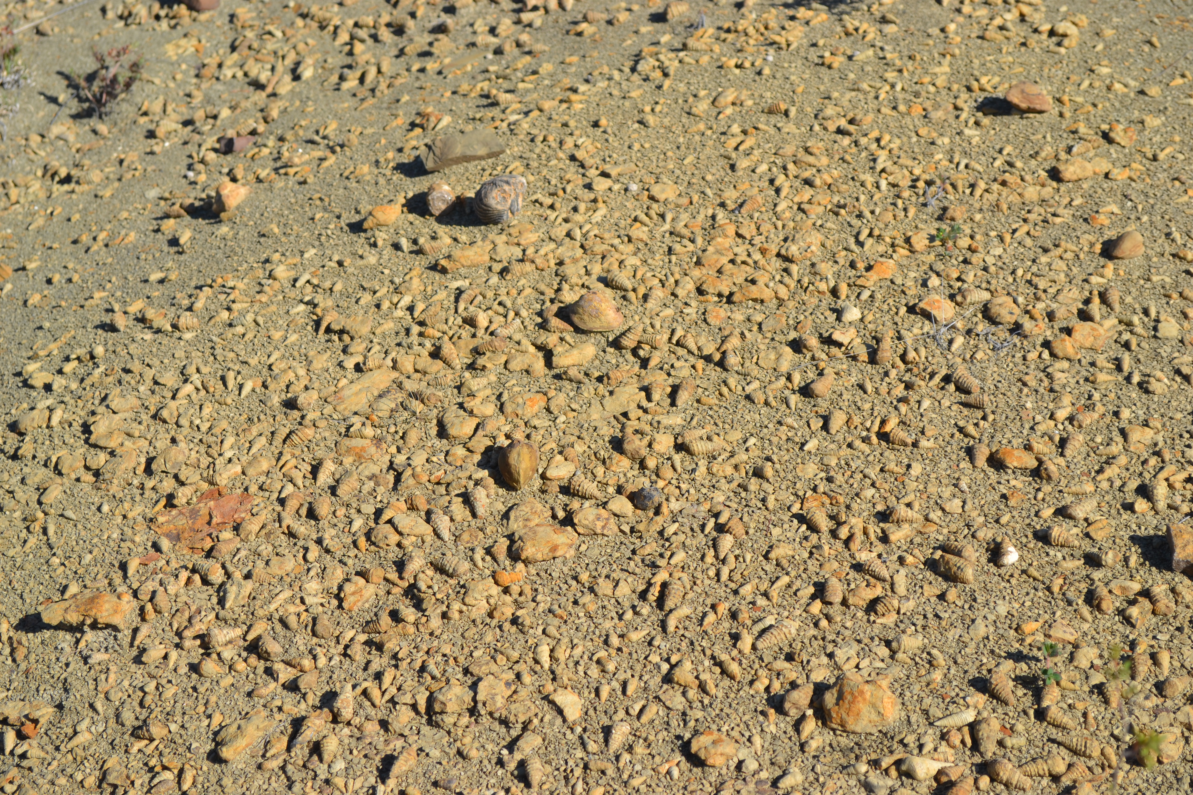 Turritelas de San Juan Raya, Puebla, México.